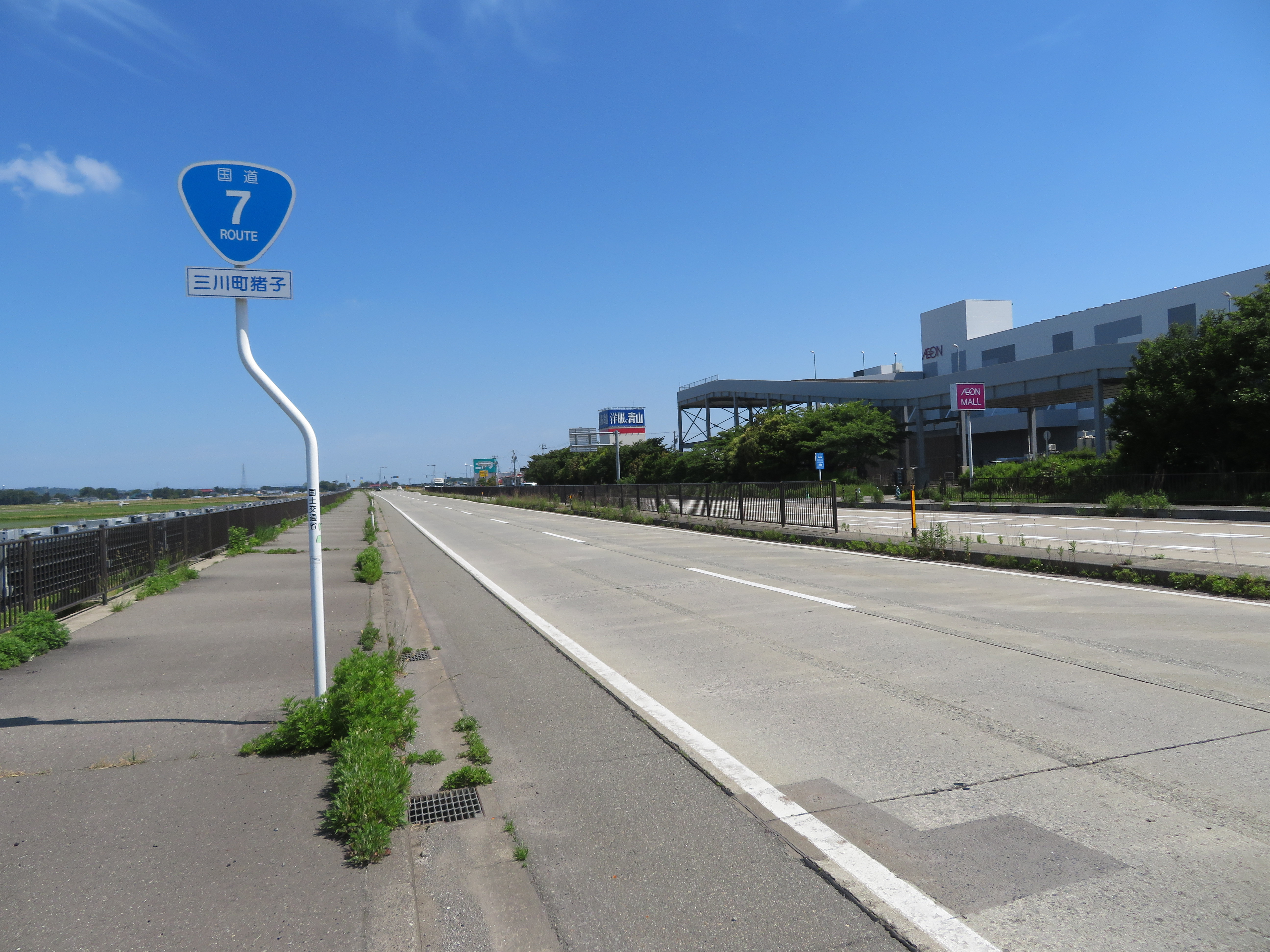 国道7号線三川バイパス 山形県東田川郡三川町猪子付近（酒田方面を撮影） Canon PowerShot SX720 HS